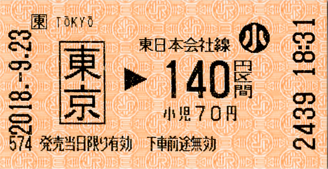 東日本旅客鉄道（JR東日本） 東京駅 初乗り乗車券（小児）